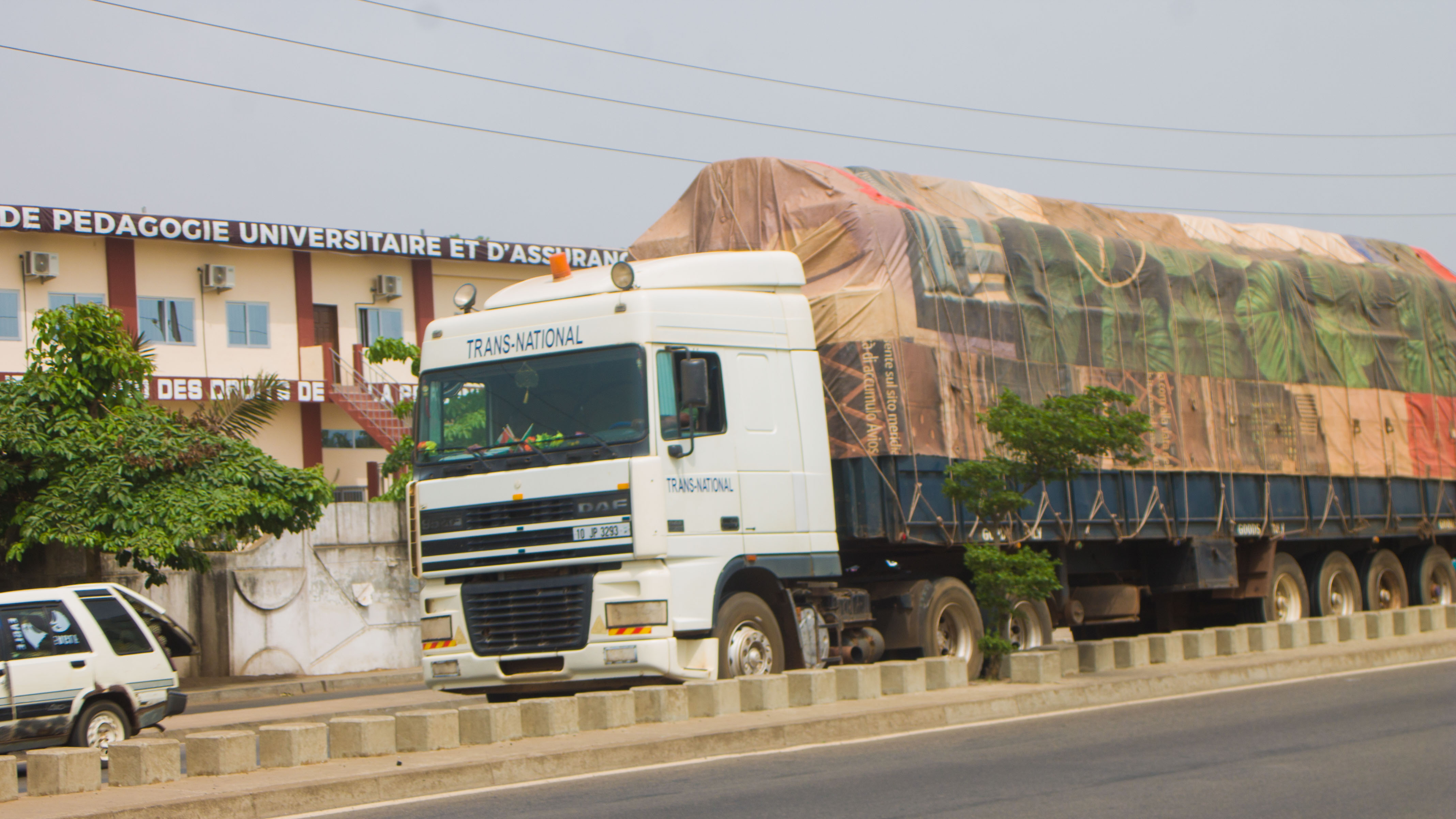 Gros porteurs chargé This is an image with the theme "Africa on the Move or Transport" from: Benin